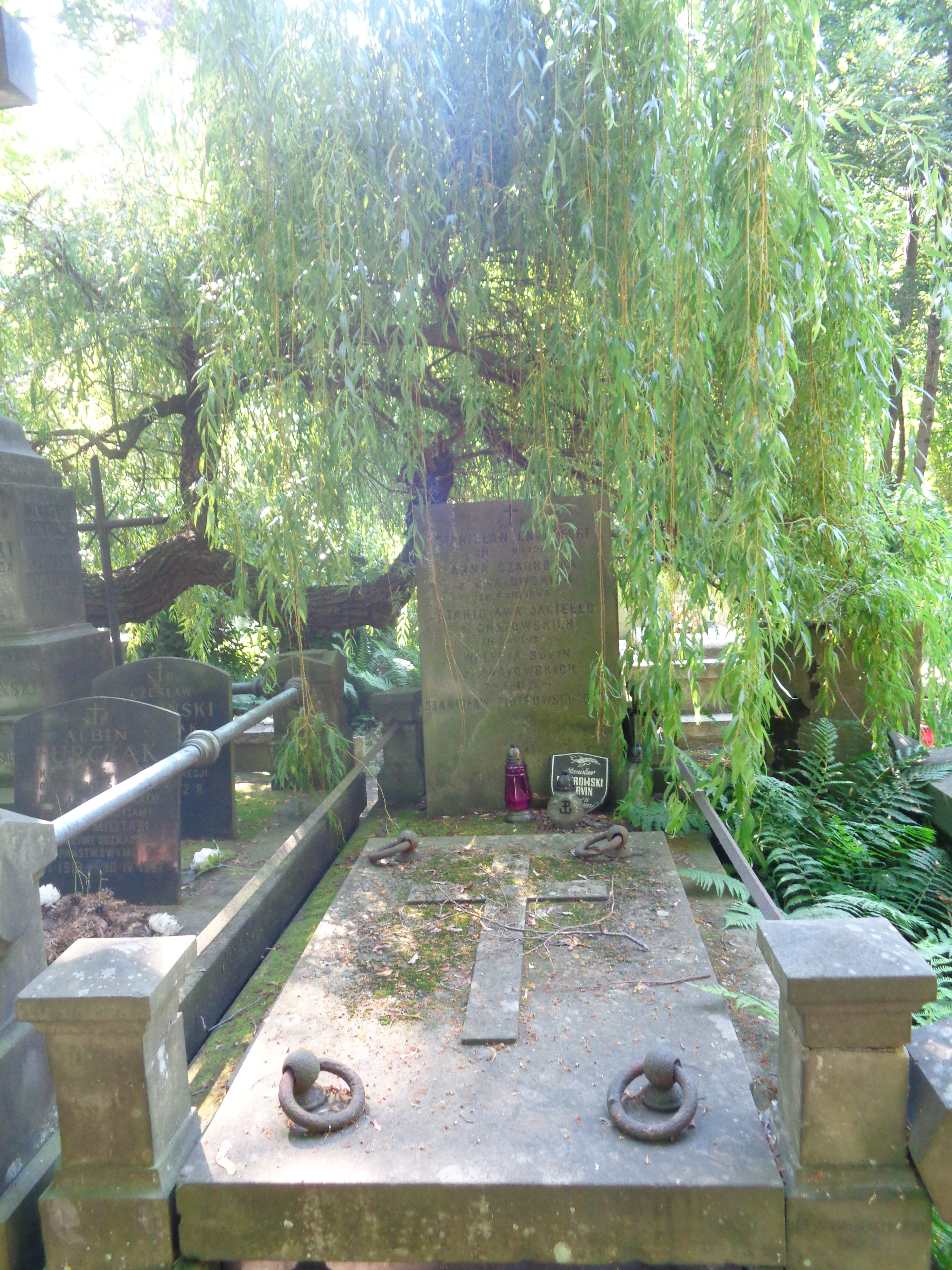 Grób Walerii Suzin na Cmentarzu Powązkowskim